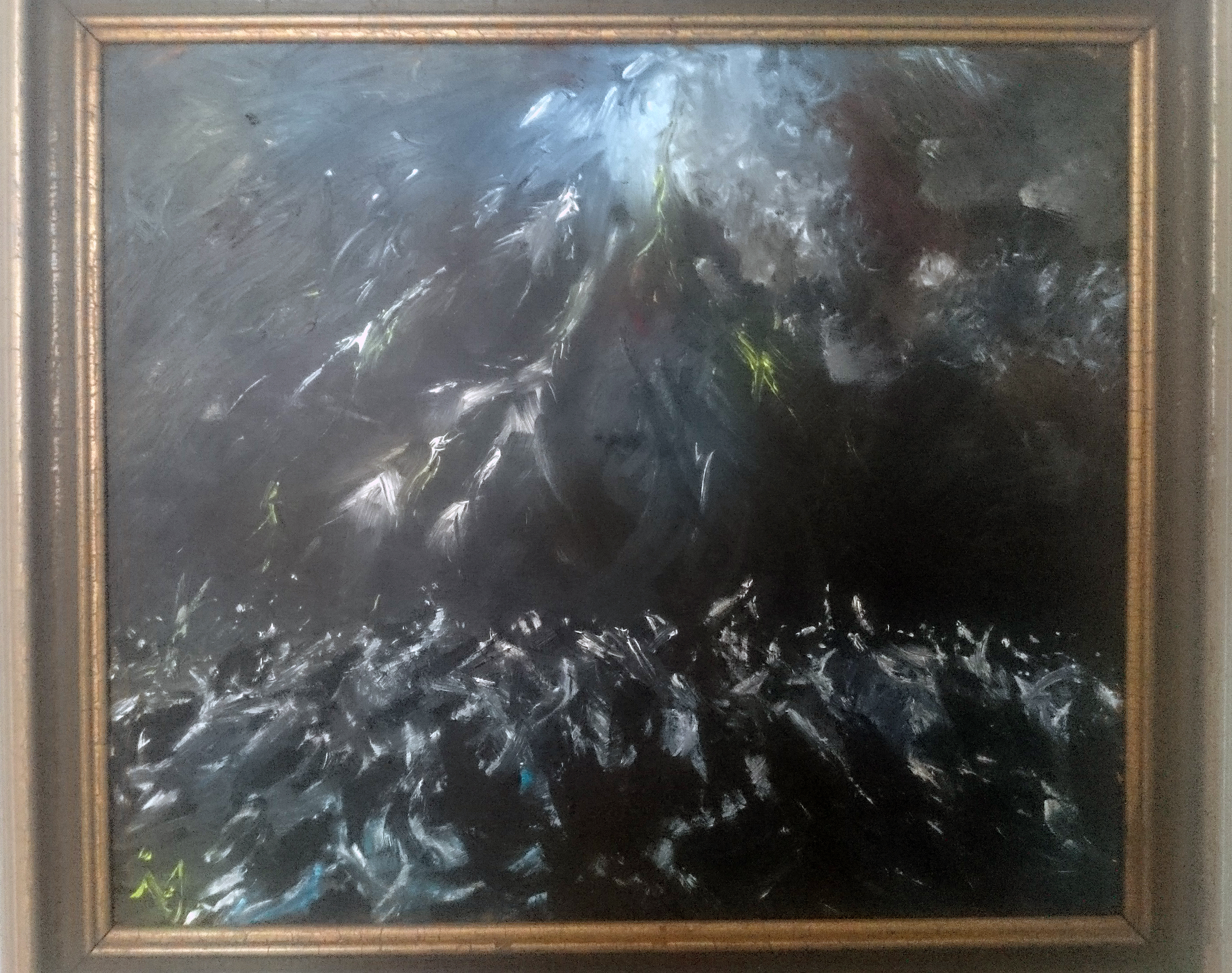 Bildkonst kan vara abstrakt varvid upplevelsen av samma motiv kan variera. Tavlan kan föra tankarna till själar som letar sig upp mot en himmel eller ett oroligt hav i ett åskoväder.